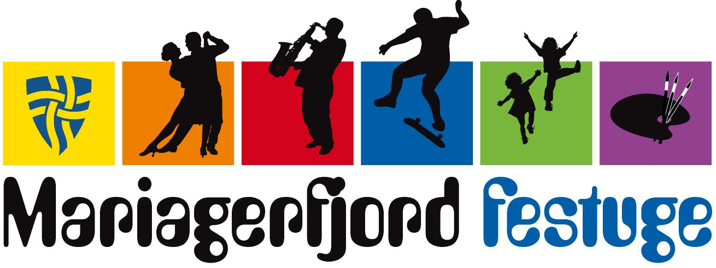 Mariagerfjord Festuges logo.